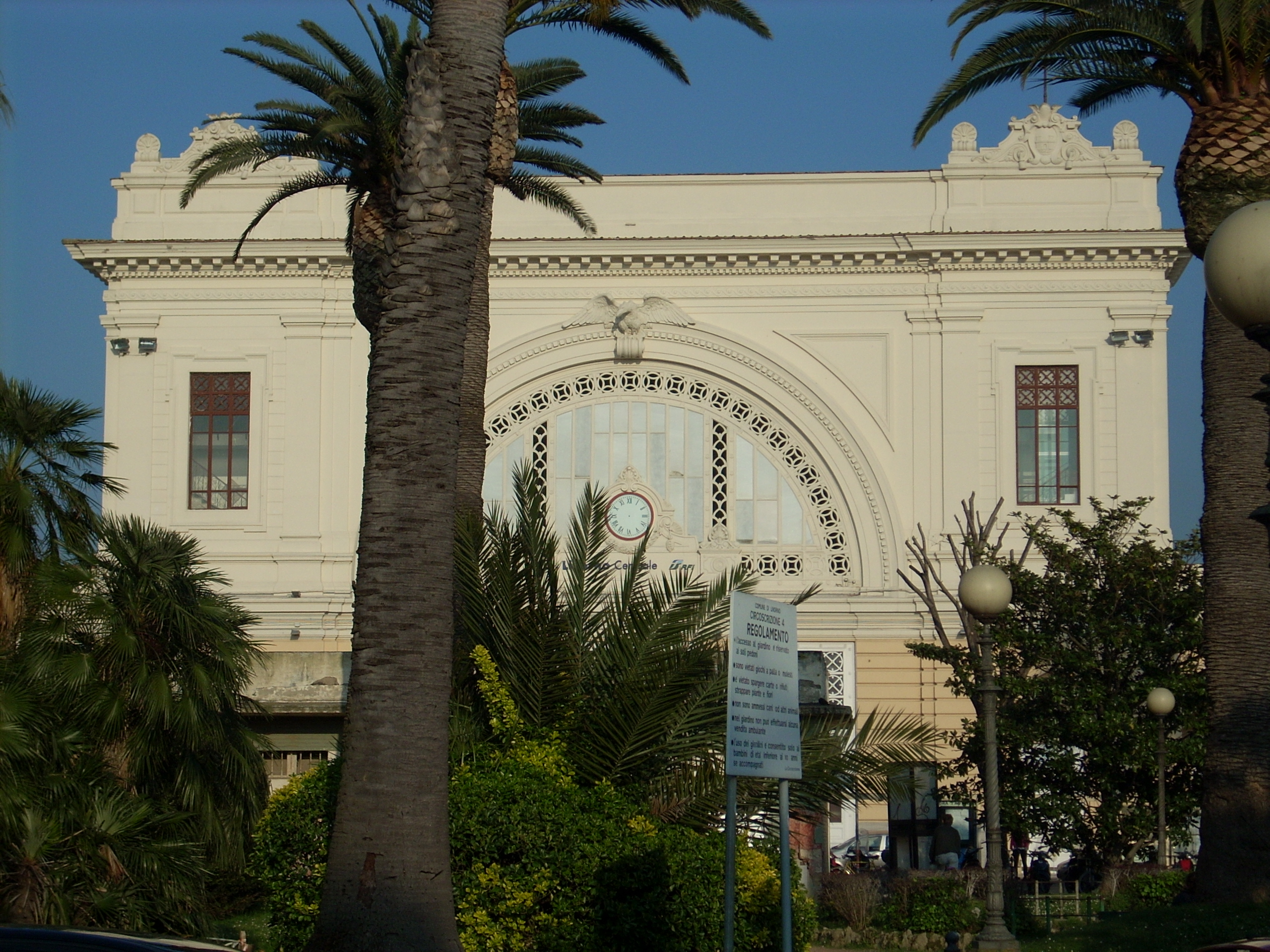 Livorno: la Stazione di Livorno Centrale inaugurata nei primi anni del Novecento sulla linea Pisa-Livorno-Roma.